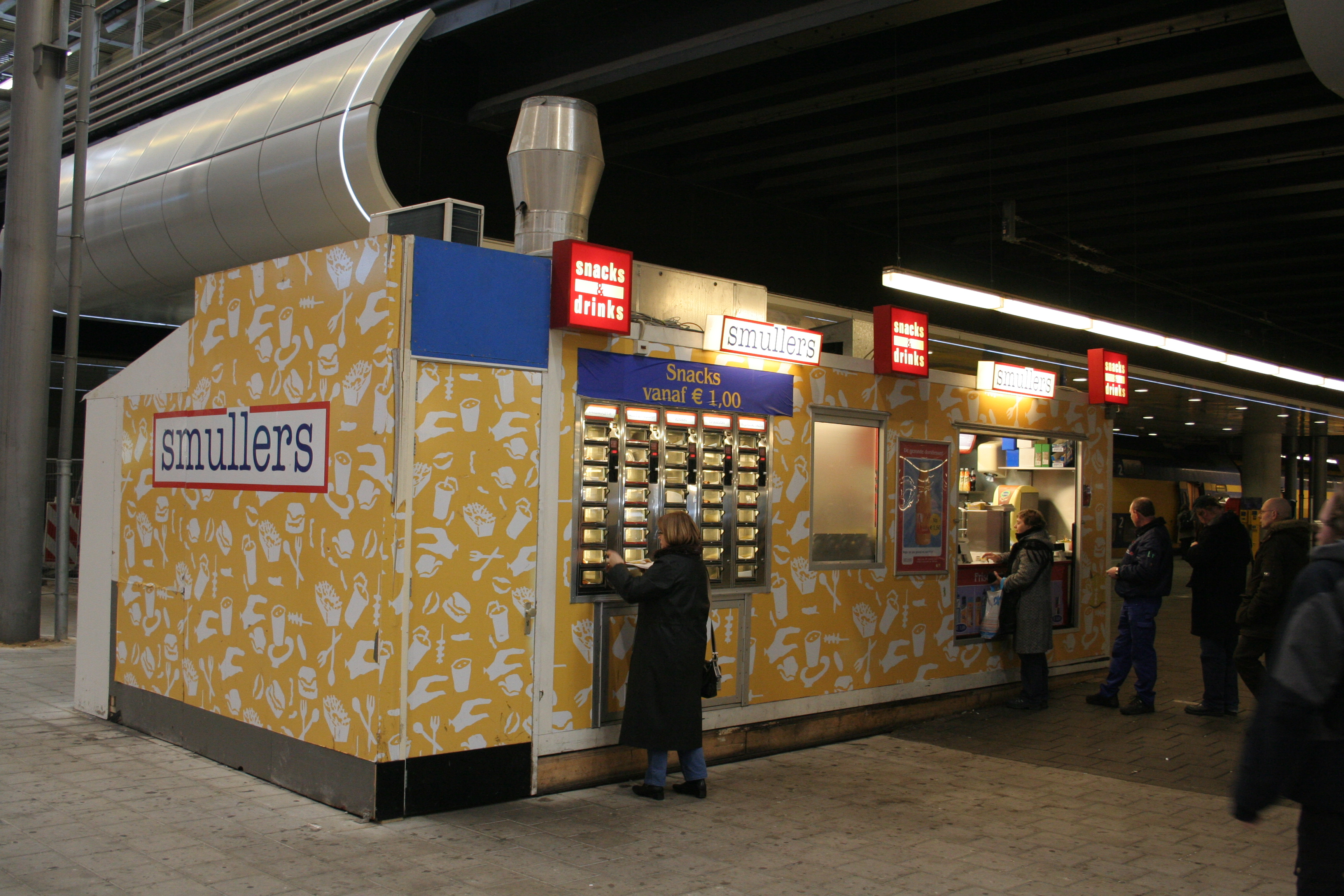 Smullers Servex in Den Haag Centraal.